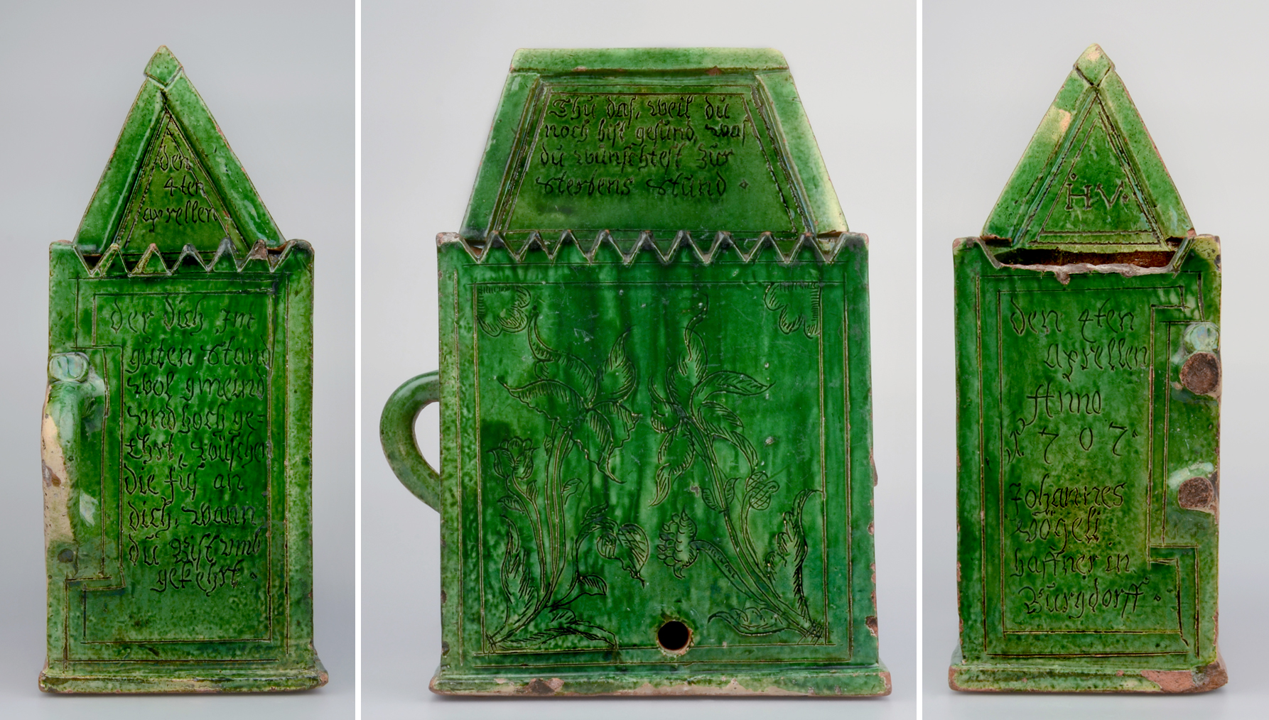 Wandbrunnen des Johannes Vögeli, Hafner in Burgdorf (1642-ca.1713/1714), signiert und datiert 1707 (Schlossmuseum Burgdorf, Inv. IV-1060)